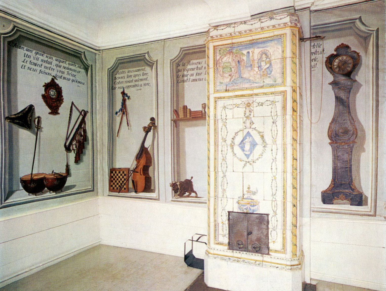 Åkerö slott, interiör i ena flygeln, tapeter i trompe l'œil-stil. Väggen i det största rummet i norra flygeln har en illusionistisk teknik, temat var "en ostädad sal". Tapetsviten utfördes ursprungligen av Johan Pasch 1753 för Läckö slott, som förlänats Carl Gustaf Tessin (1695-1770) som arrende, och flyttades sedan de suttit i Tessinska palatset i Stockholm till Åkerö efter Tessins död 1770.